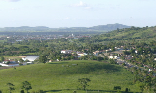 Distrito de Rua Nova, Município de Belém-PB